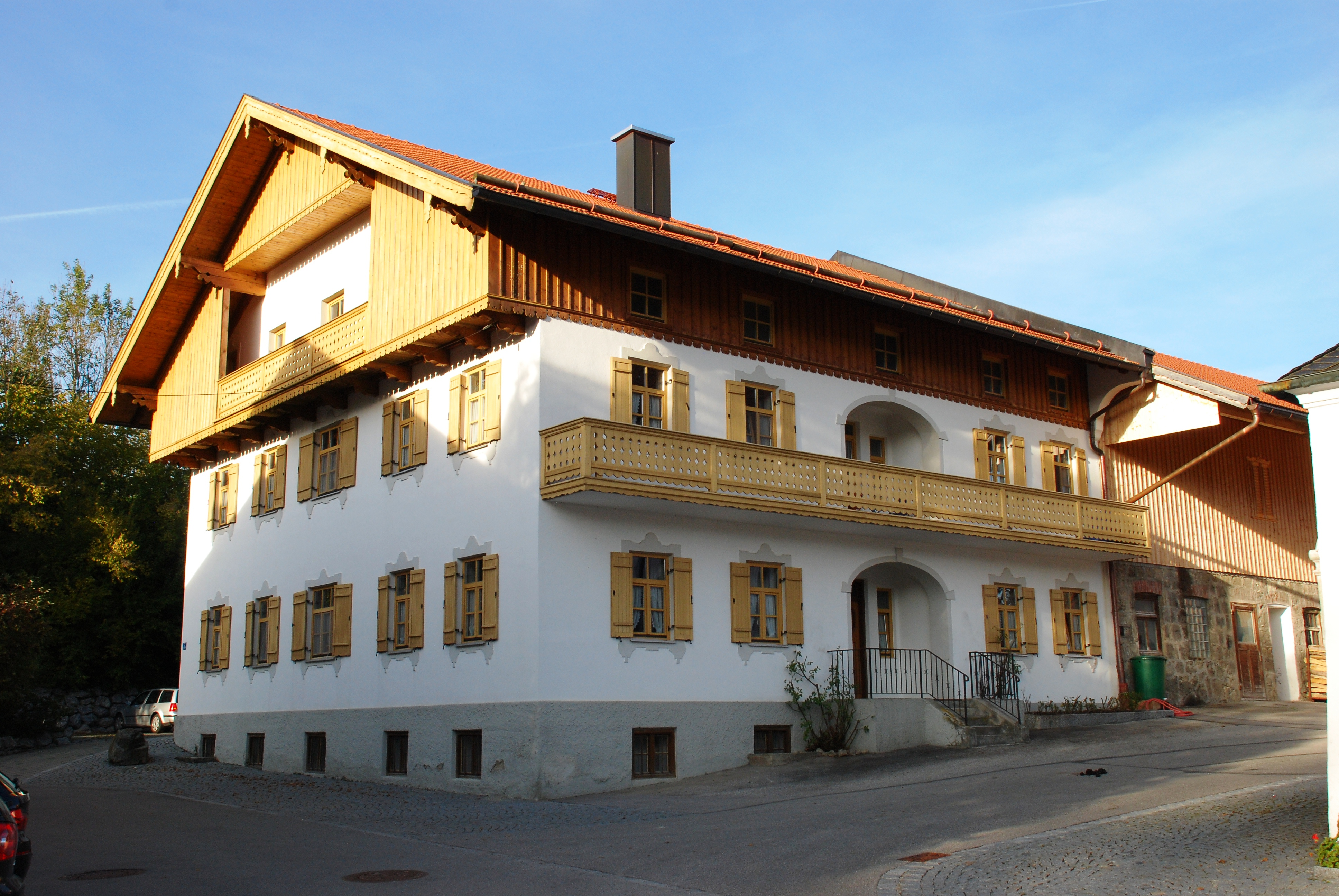 Bauernhof Haus Nummer 7 in Kleinhelfendorf, Ortsteil von Aying, Landkreis München, Regierungsbezirk Oberbayern, Bayern. Als Baudenkmal unter Aktennummer D-1-84-137-47 in der Bayerischen Denkmalliste aufgeführt. Laut Denkmalliste im Jahr 1923 erbaut. Bild gemäß den Vorgaben zur Panoramafreiheit von öffentlichem Verkehrsgrund aus aufgenommen.